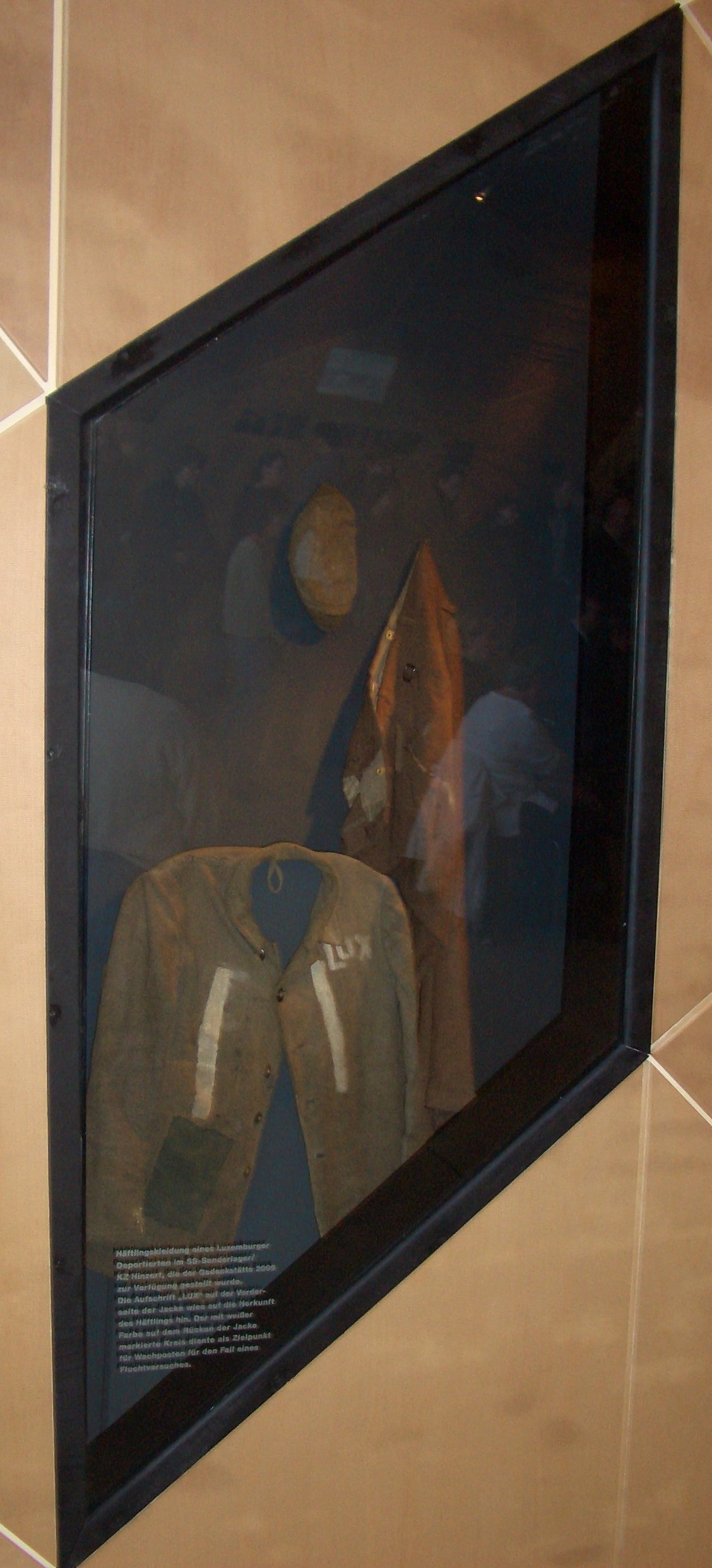 SS-Sonderlager/KZ Hinzert, prisoners' clothes